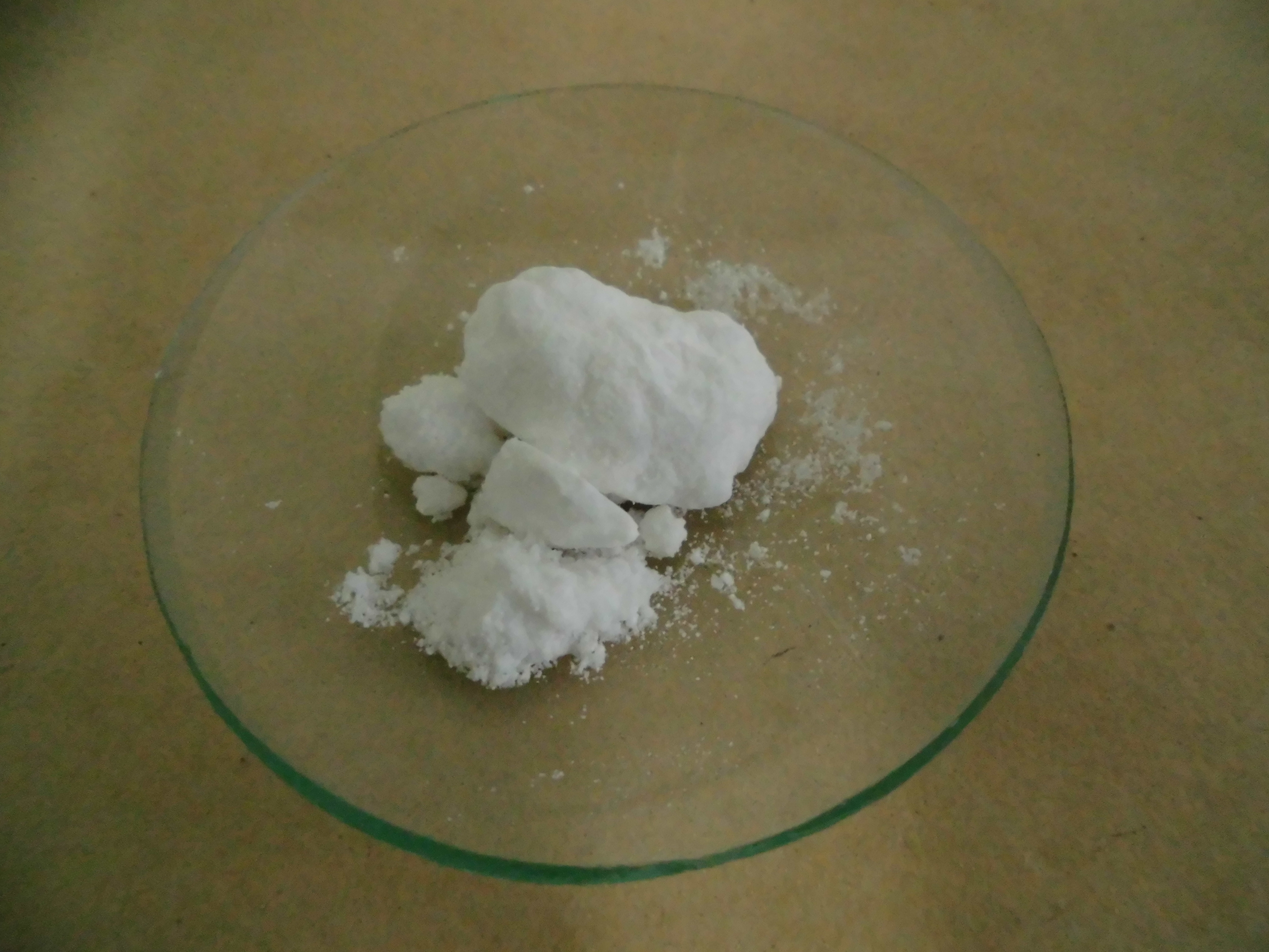 硫酸镉水合物，分析纯，含量（3CdSO4·8H2O）≥99.0%。